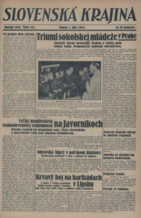 Titulný list denníka Slovenská krajina, ktorý vychádzal na Slovensku v 30-ych rokoch 20. storočia